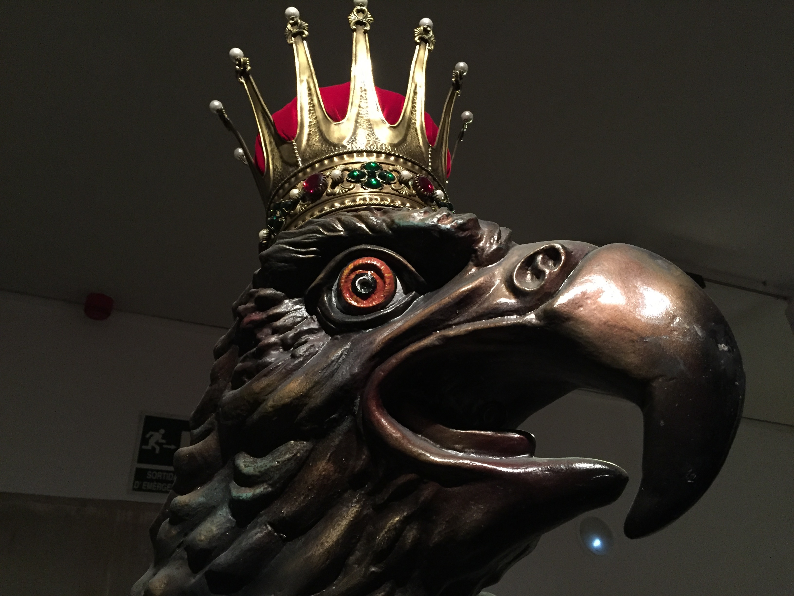 Figures del desdoblament. Titelles, màquines i fils exposició a l'Arts Santa Mónica de Barcelona